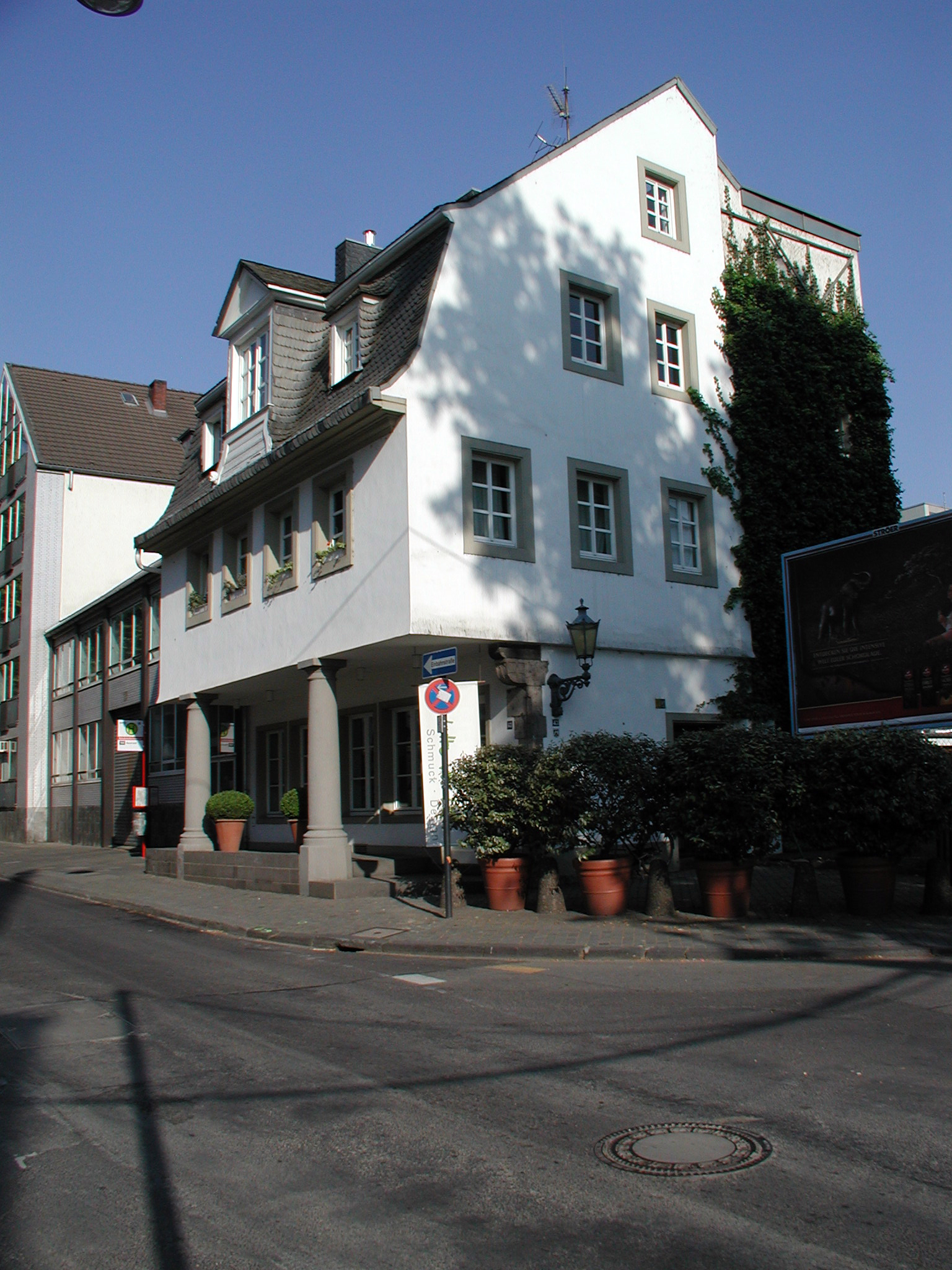 Kölner Bäche